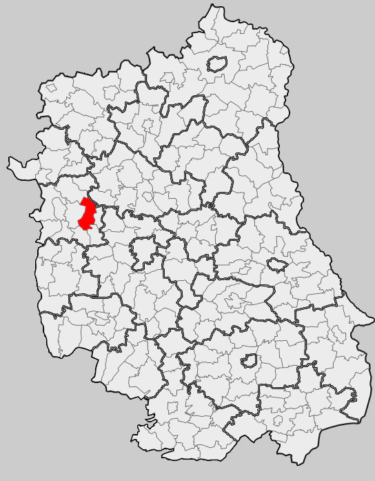 Map of gmina Kurów, Puławy county, Lublin voivodship Mapa gminy Kurów, powiat puławski, województwo lubelskie